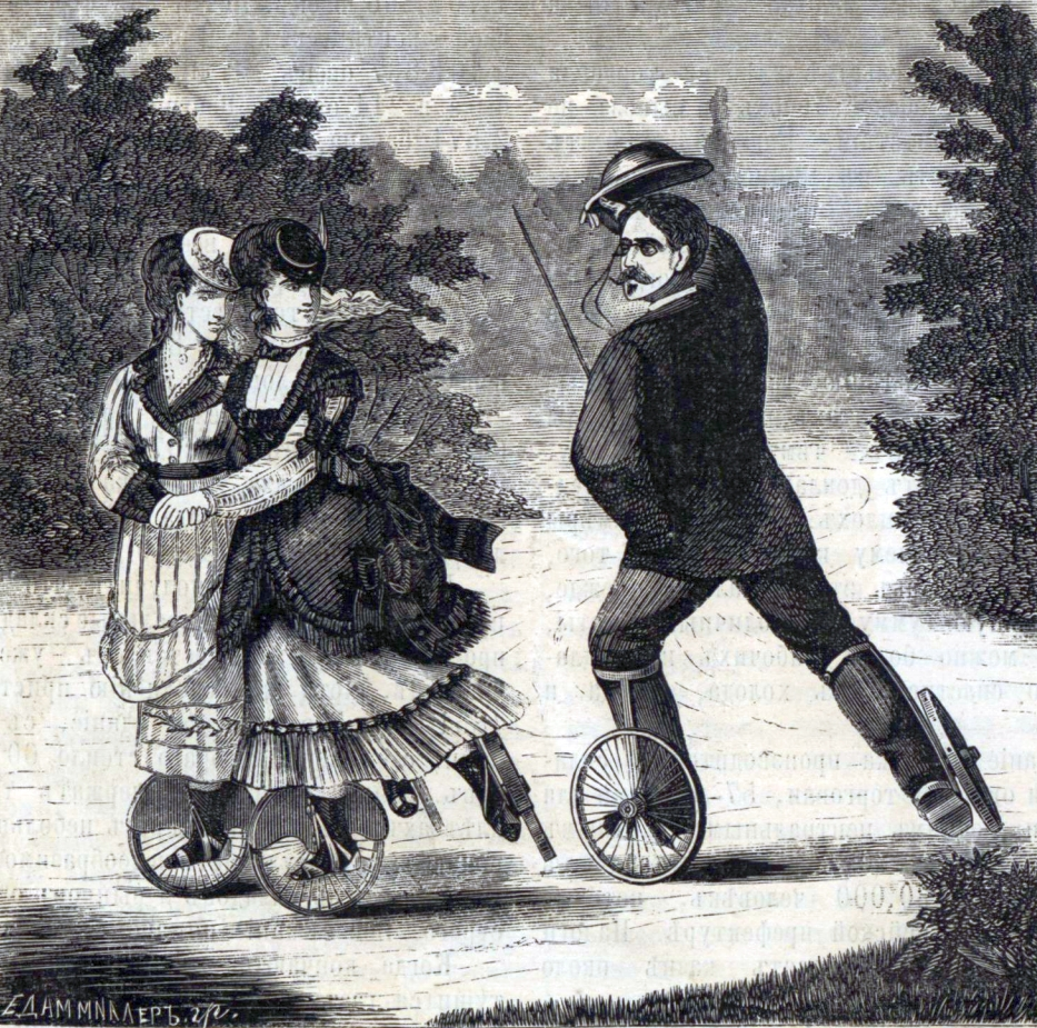 Педеспид.